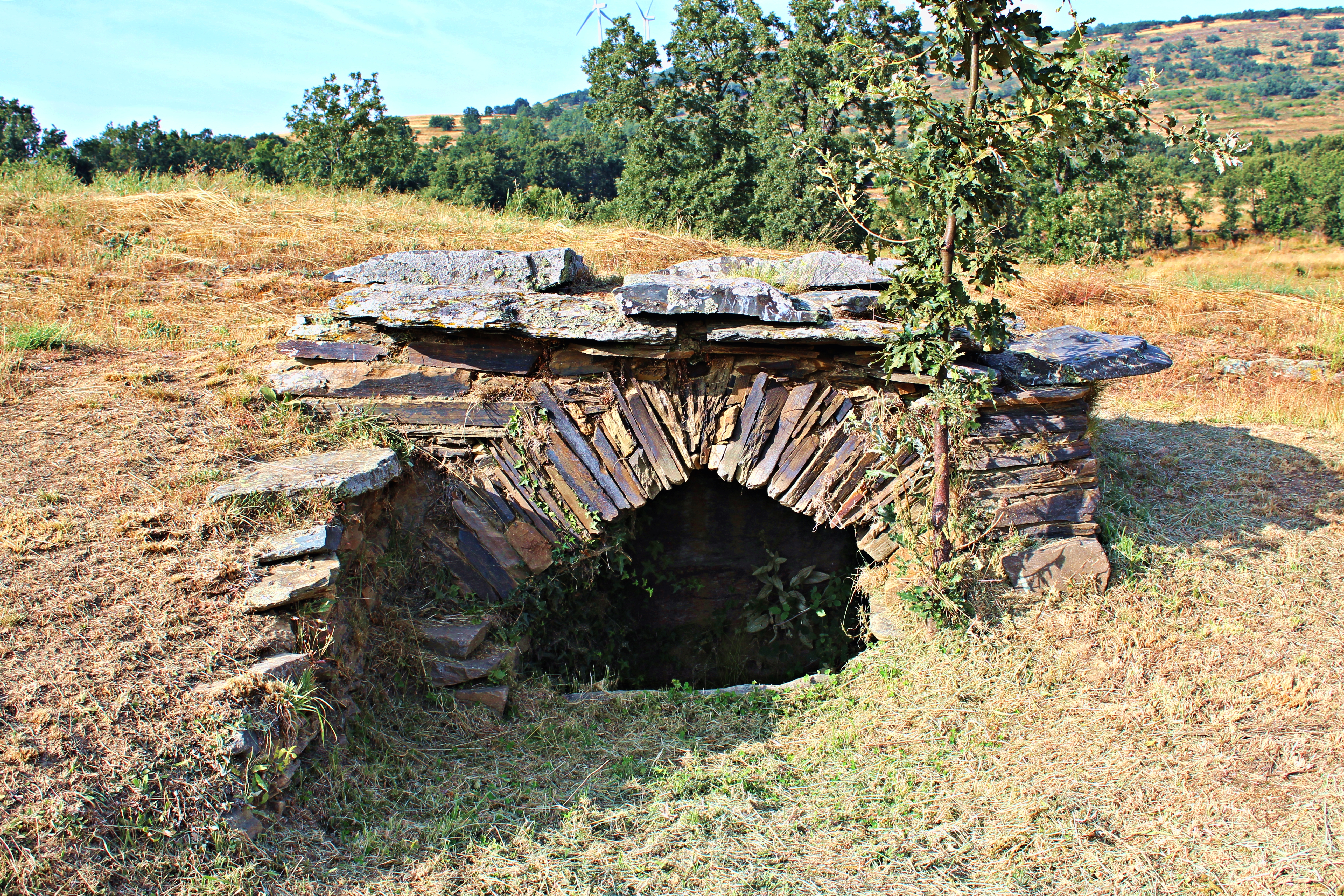 Lucillo, comarca de La Maragatería, provincia de León